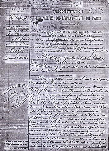 Reconstitution de l’acte de décès de Stendhal